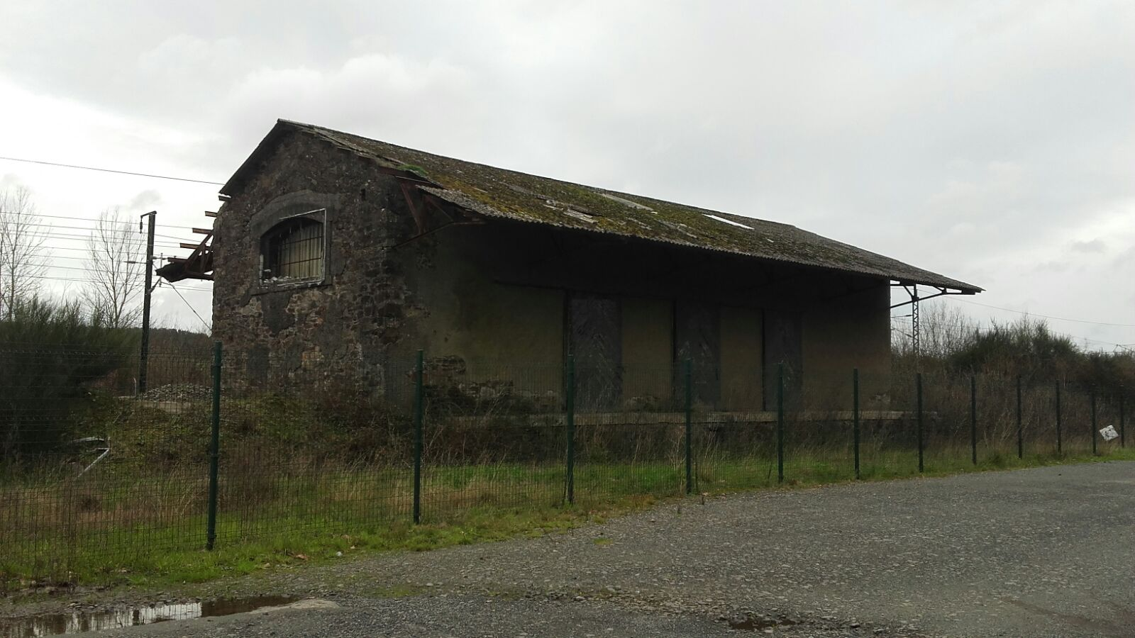 Ésta é a antiga estación de tren de Vilacide de Abaixo-Estación de Oroso.